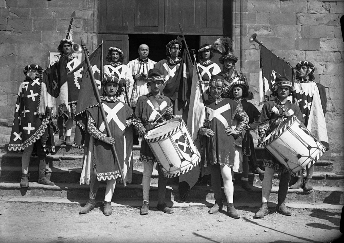 Tamburini e Alfieri del quartiere di Porta S Andrea sul sagrato della chiesa di S Agostino (1934)